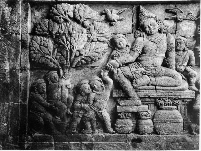 Foto. Fragment van een reliëf op een tempelwand van Tjandi Mendoet.